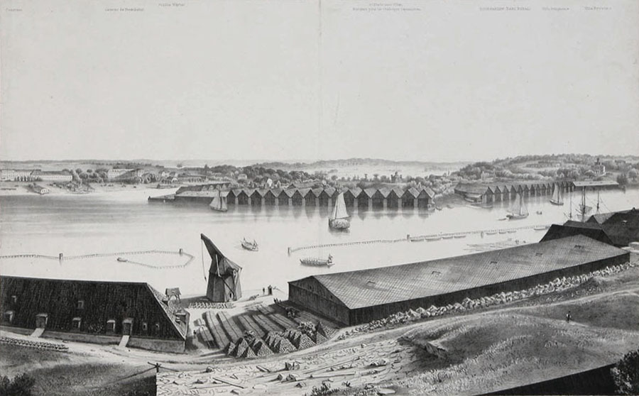 Galärvarvet, Stockholm